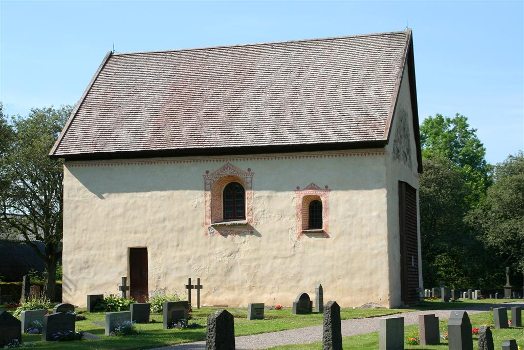 Foto: Tor Svensson